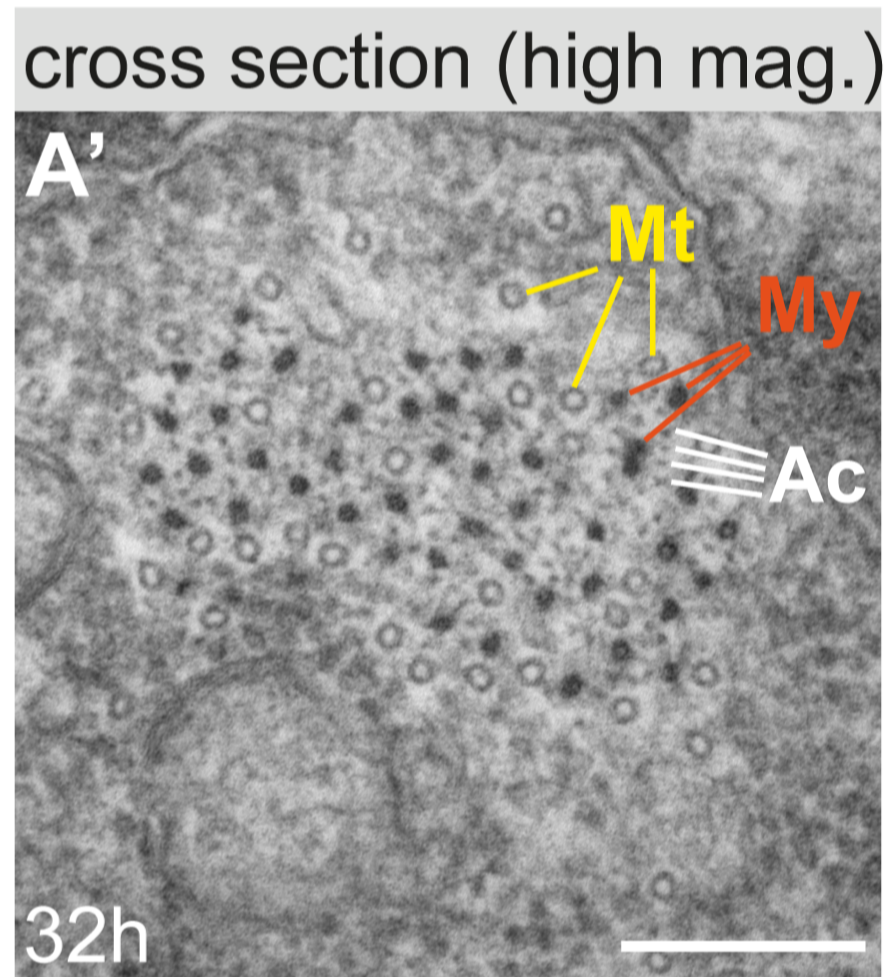 Fig. 3. Microscopía electrónica de miofibrillas de músculo de vuelo en desarrollo y adultas. (A) Imágenes de microscopía electrónica de transmisión, de las secciones transversales. La miofibrilla es difícil de discernir a las 32 H. Los filamentos de miosina (círculos oscuros; marcados con "My" en naranja) están al lado de los filamentos de actina (círculos pequeños y más claros "Ac" en blanco). Los círculos grandes y abiertos son microtúbulos ("Mt" en amarillo). Barra de escala 0.2 μm.